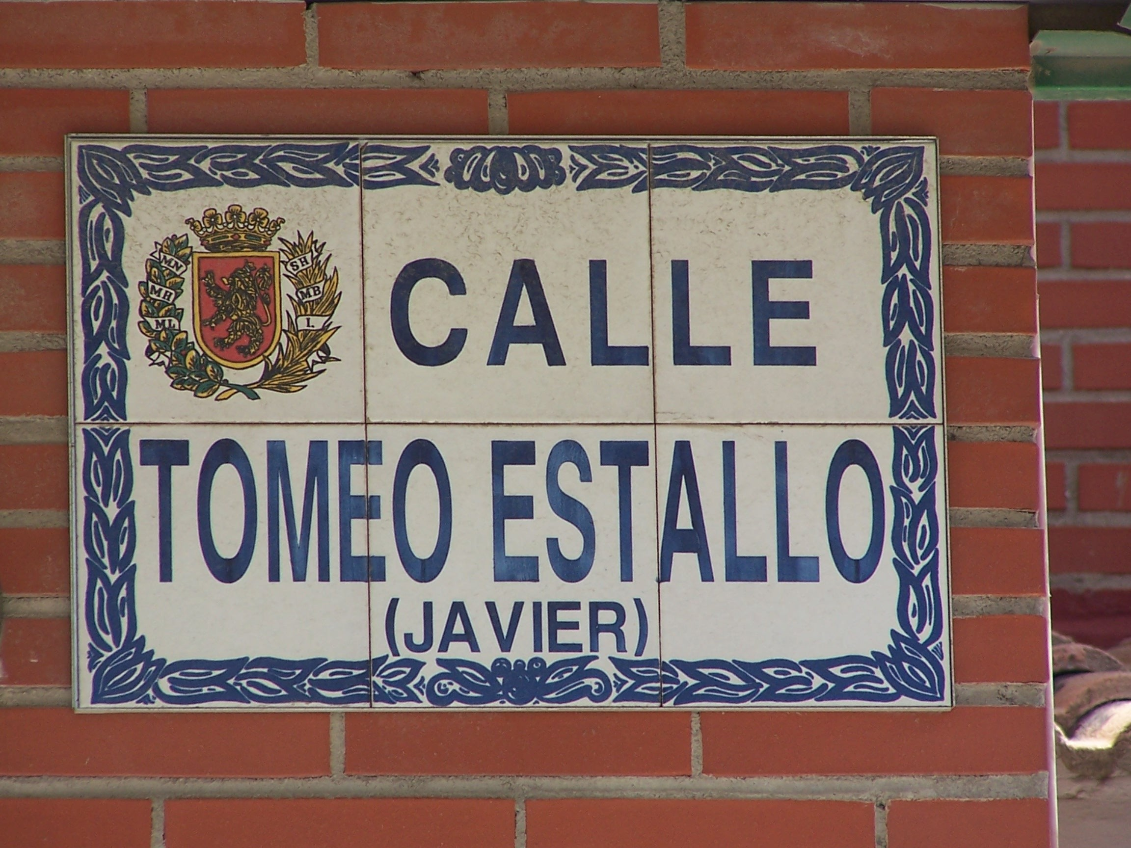 Placa de la calle Javier Tomeo Estallo en Zaragoza.